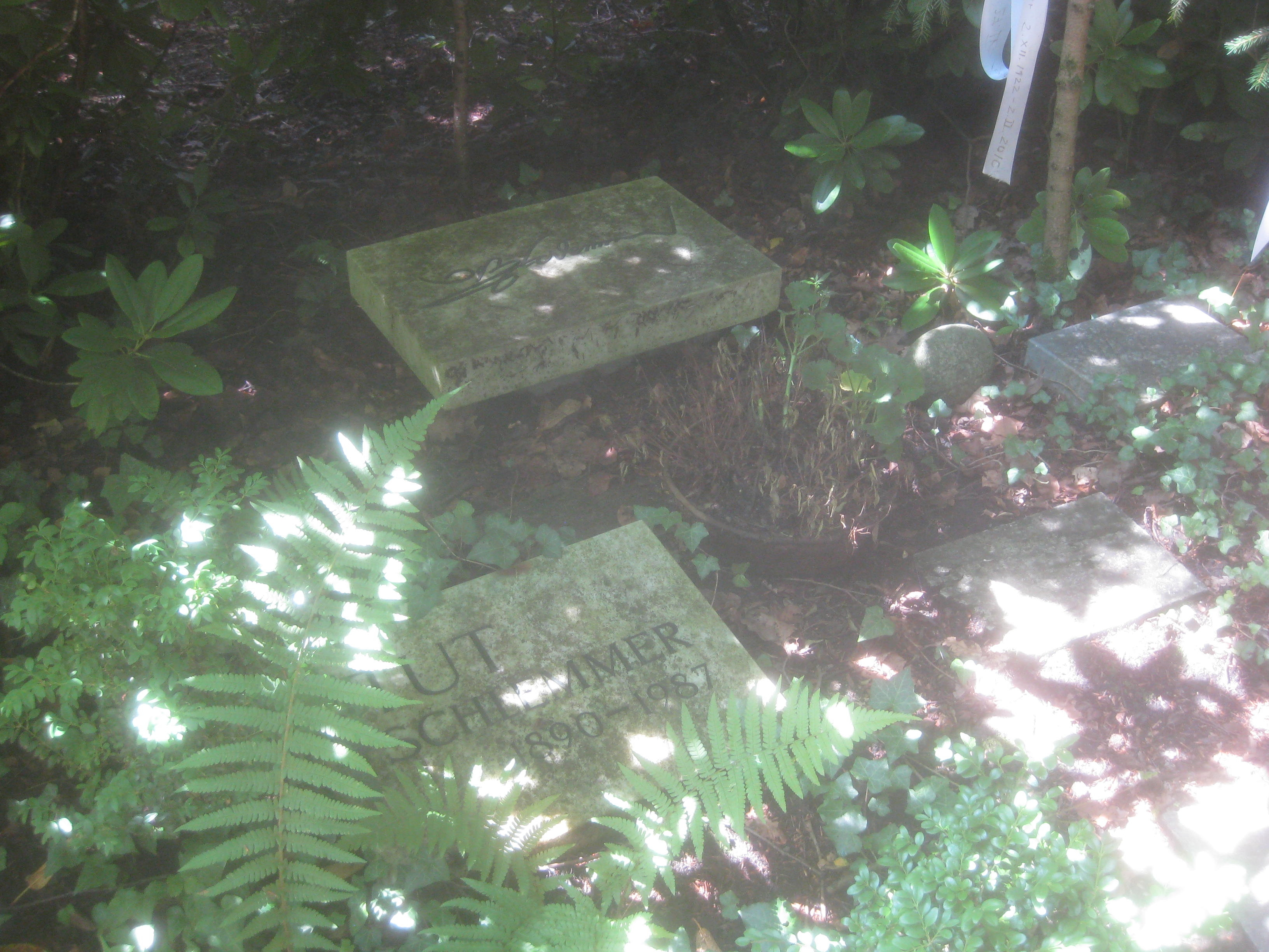 Grab von Oskar Schlemmer, Stuttgart, Waldfriedhof Stuttgart, Abteilung 14 f2.